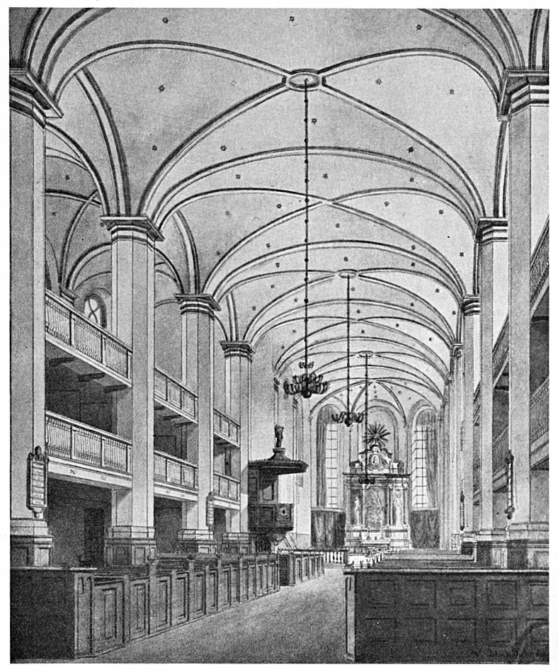 Helligåndskirken, Copenhagen, Denmark. Interior drawn 1875 by Chr. Bloch-Suhr